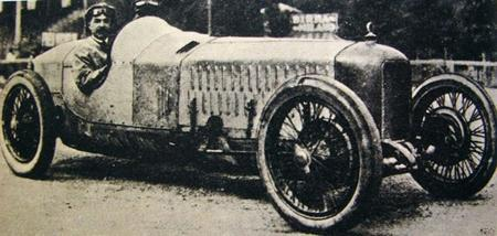 Summary: Ugo Sivocci at the wheel of 1923 Alfa Romeo P1 GP by Merosi